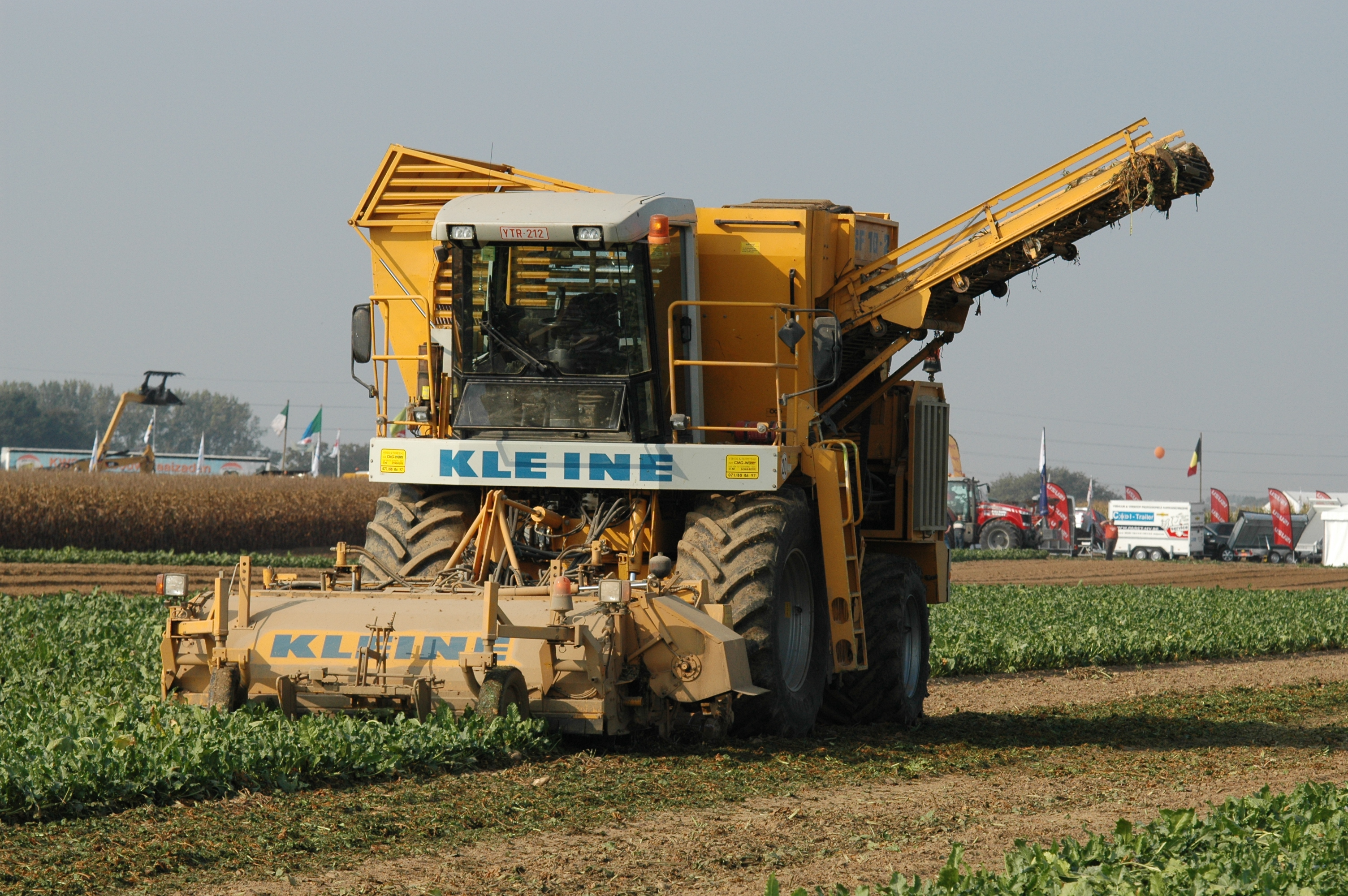 Rübenroder Franz Kleine SF 10-2, Werktuigendagen 2009